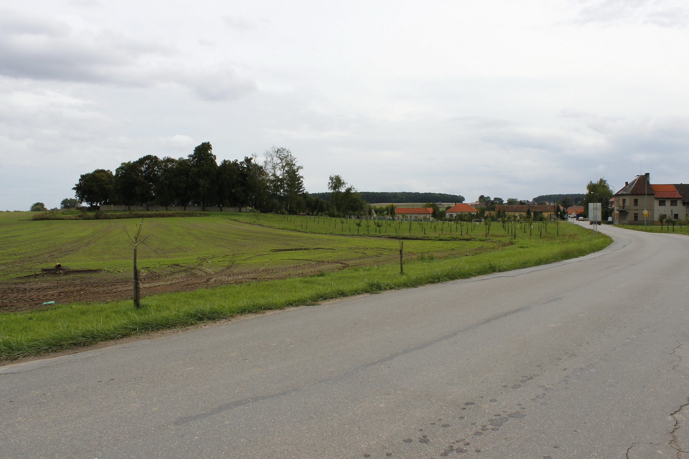 Stará Lysá, pohled od bývalého statku Alžbětín ke hřbitovu.